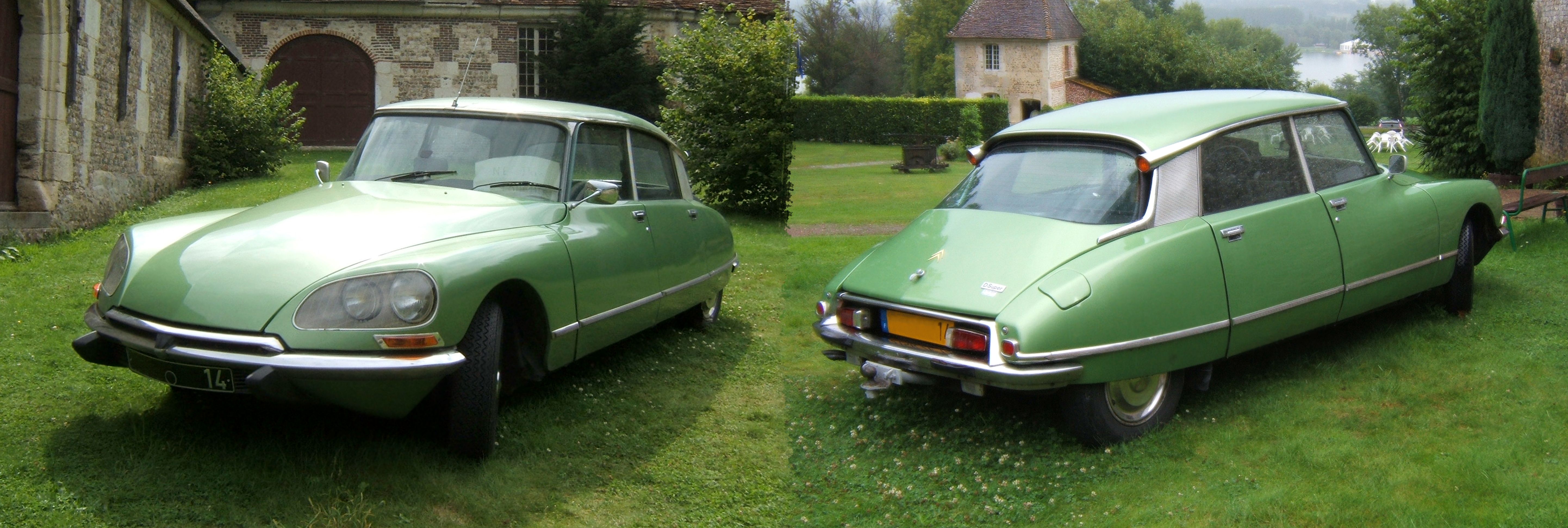 Une DS Super au Musée Automobile de Pont-L'Evêque (aujourd'hui fermé), dans le Calvados.